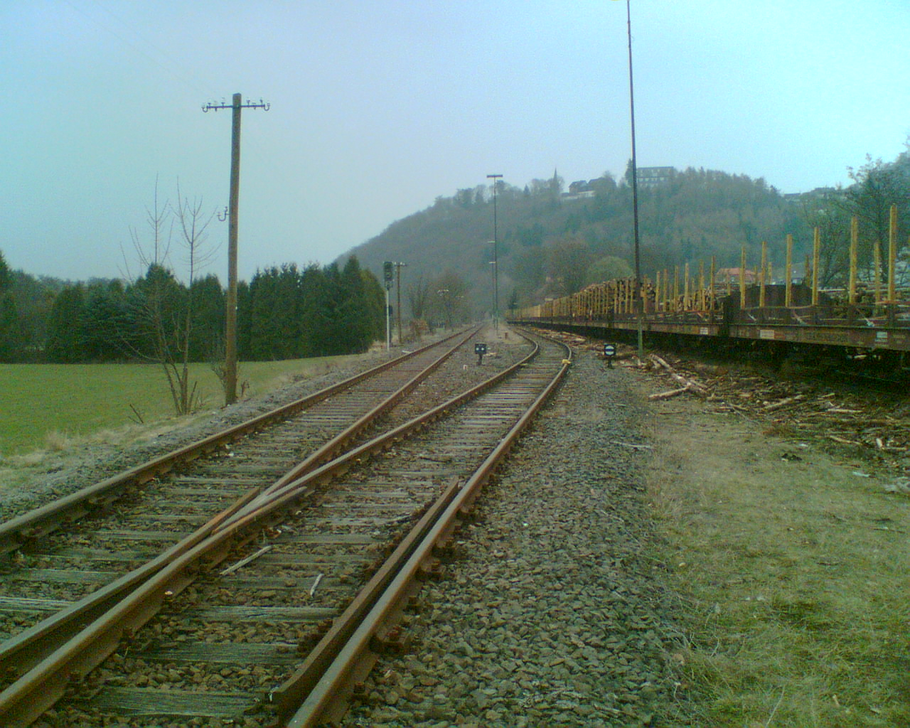 Im Vordergrund sieht man den Bahnhof Battenberg (Eder) mit der Holzverladung. Im Hintergrund auf dem Berg sieht man die Altstadt von Battenberg (Eder).